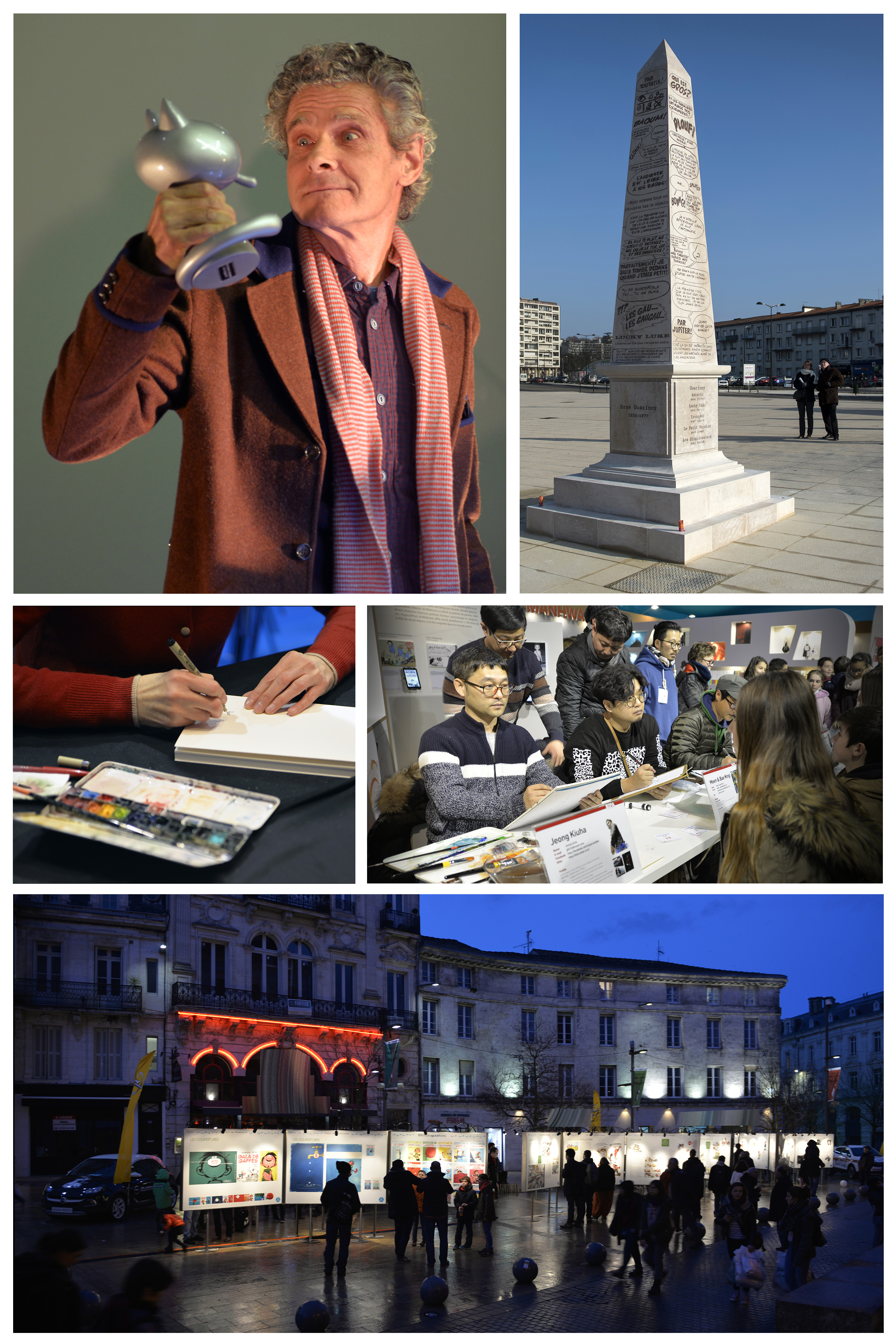 Cinq vues du Festival International de la Bande Dessinée d'Angoulême 2017 : Cosey, Grand prix 2017, l'obélisque Goscinny, Brigitte Findakly en dédicace, des dessinateurs du stand sud-coréen et l'exposition Gaston Lagaffe.